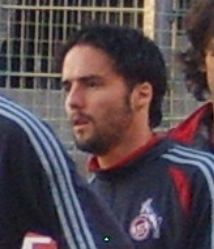 Ricardo Cabanas, 1.FC Köln